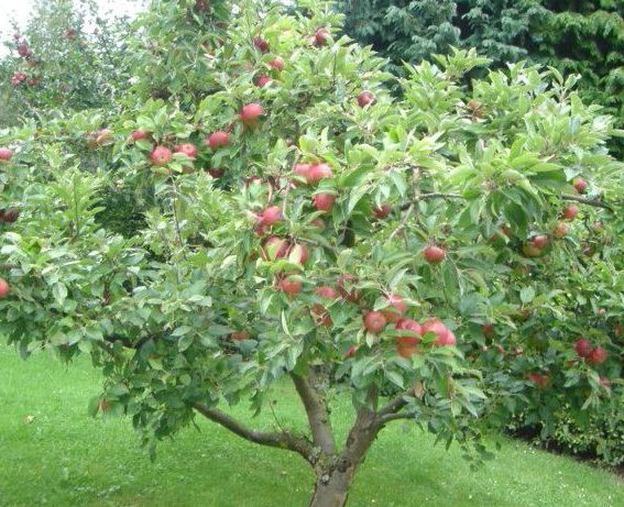 Appletree